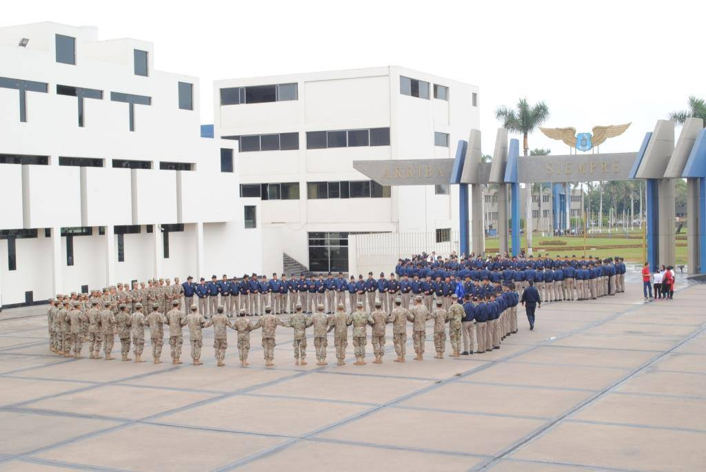 Particiáción de Cadetes FAP en simulacro de sismo.